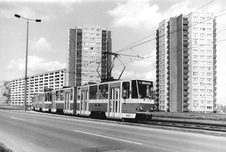 ADN-ZB-Ludwig-13.5.1983-Erfurt: 100 Jahre Straßenbahn- Als am 13.5.1883 der Straßenbahnverkehr aufgenommen wurde, konnte sich wohl kaum einer die Entwicklung vorstellen, die er durchmachen sollte. Heute bestimmen leistungsfähige Tatra-Züge das Bild. So wie sich die thüringische Bezirksstadt in den letzten Jahren vergrößert hat, ist auch das Steckennetz gewachsen..